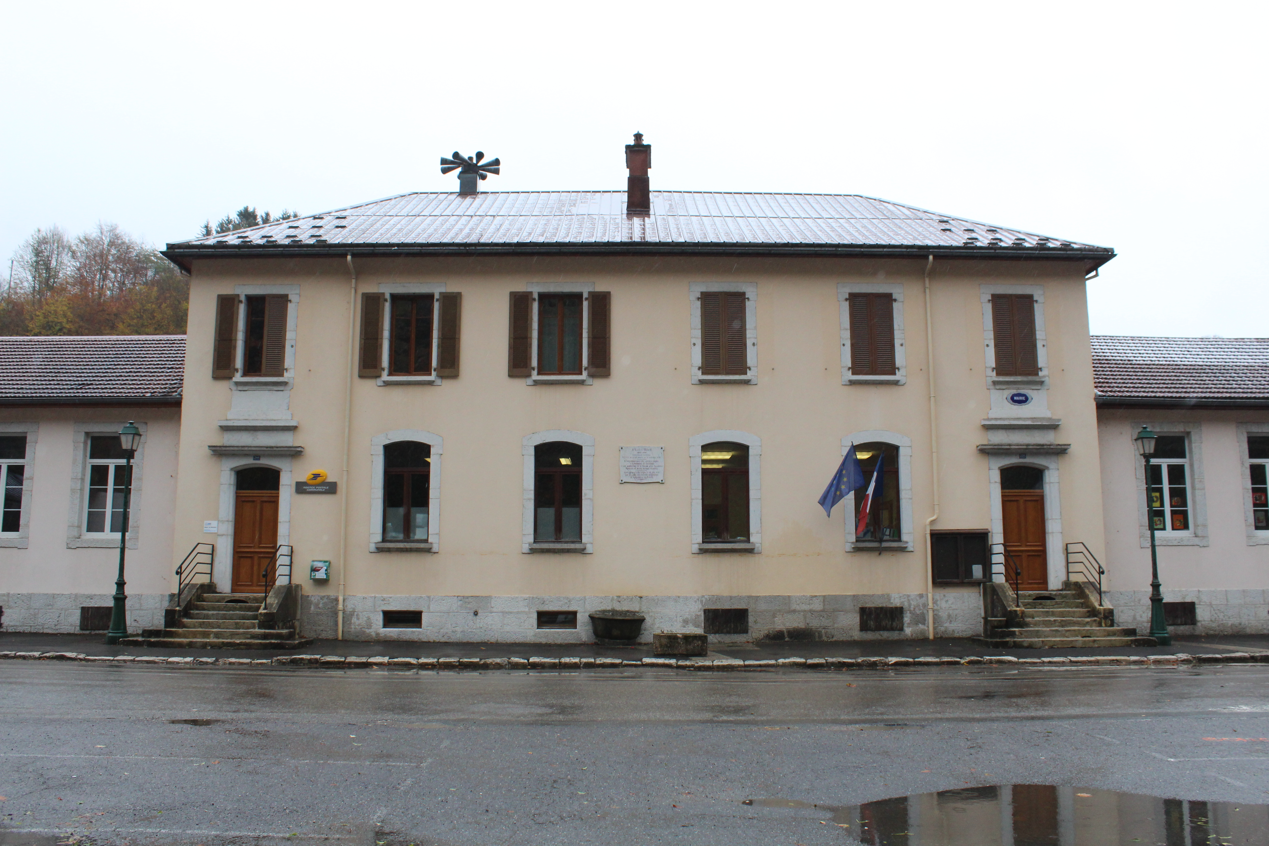 Mairie de Chézery-Forens.